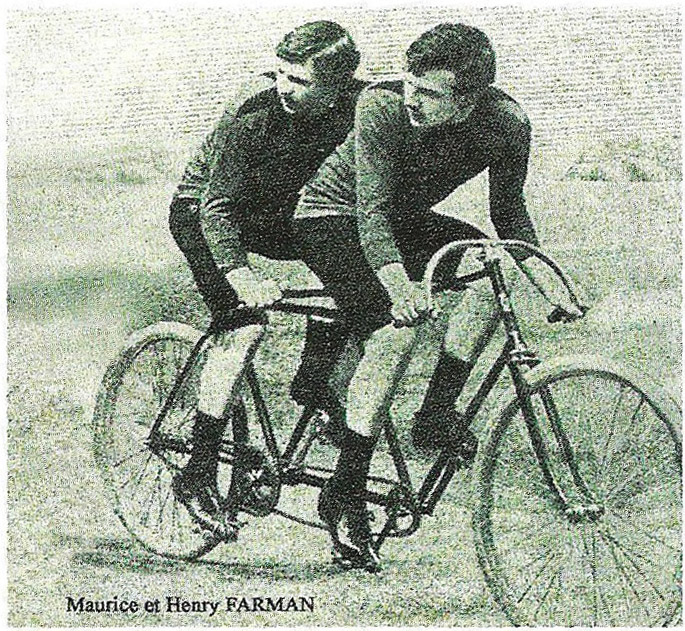 Les deux frères Farman coureurs cyclistes. Photo, Charles Barenne